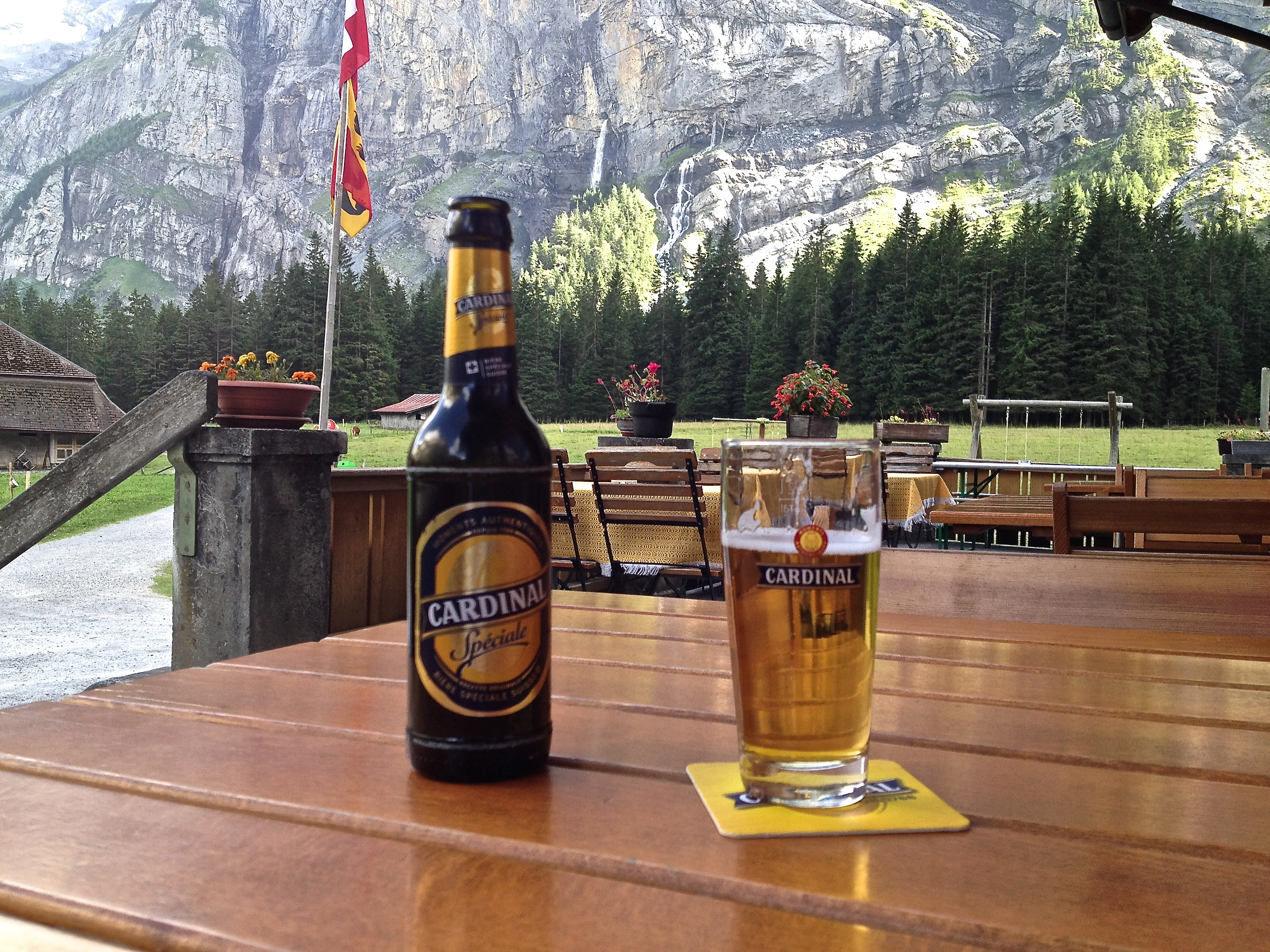 Gasterental, Berner Oberland